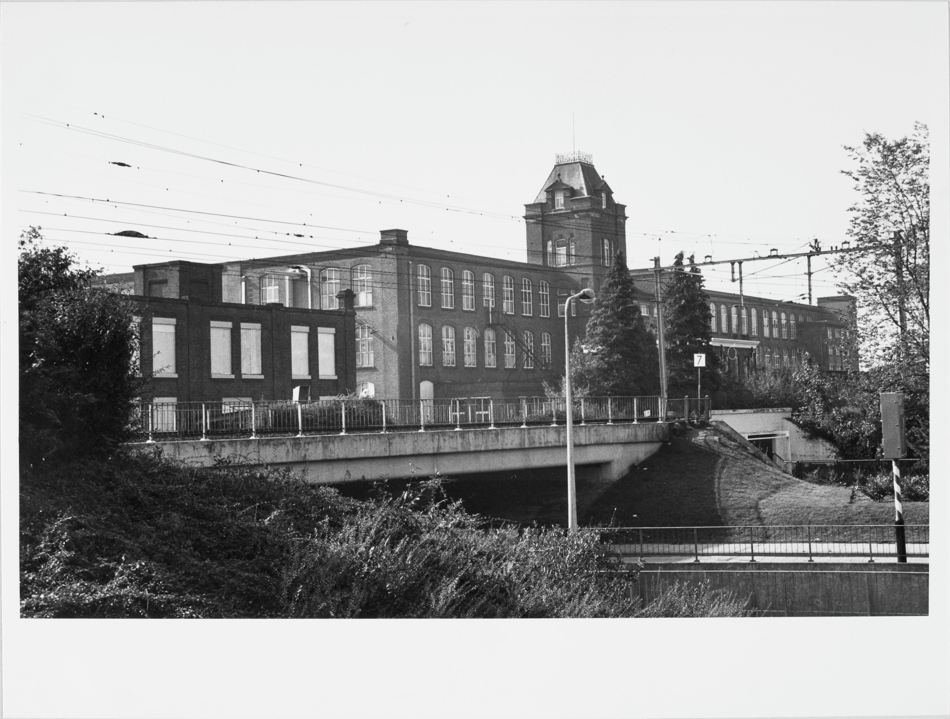 Gelderman: Gezicht op de Geldermanfabriek (opmerking: Afdrukken verkregen via Ypie Attema, oud medewerkster van de Rijksdienst voor de Monumentenzorg.)